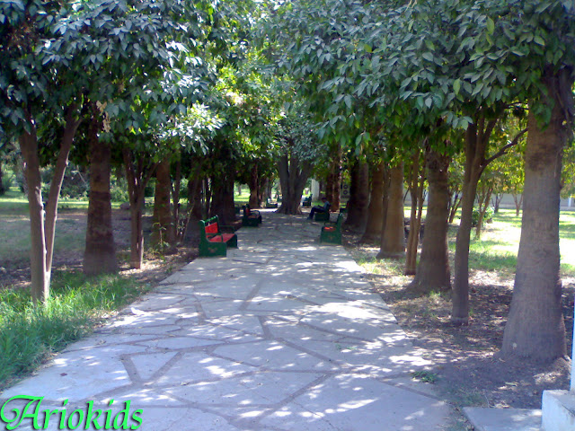 نمایی از راهرو محوطه کلاسی شماره 1 دانشگاه رامین